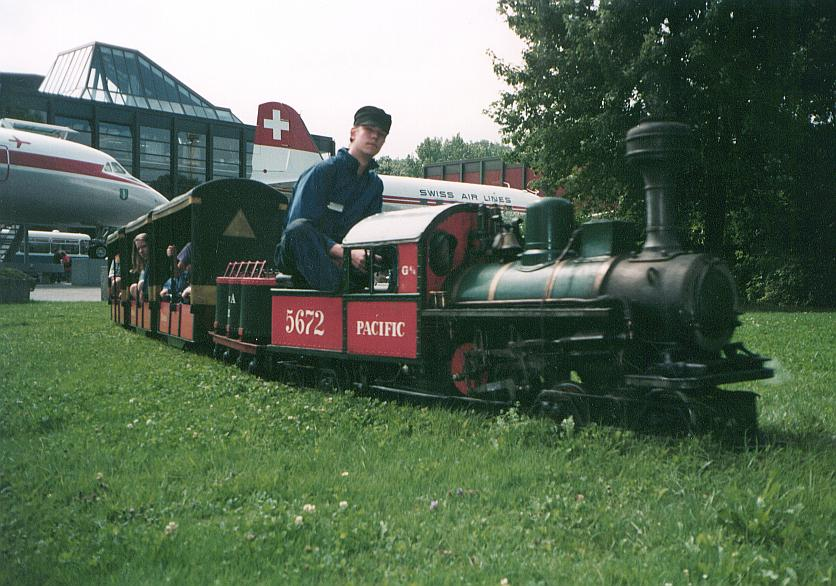 Description